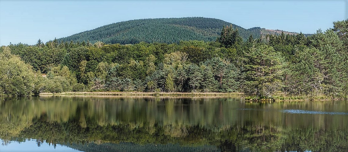 Suc au may depuis l'étang de Maurianges à Chaumeil.